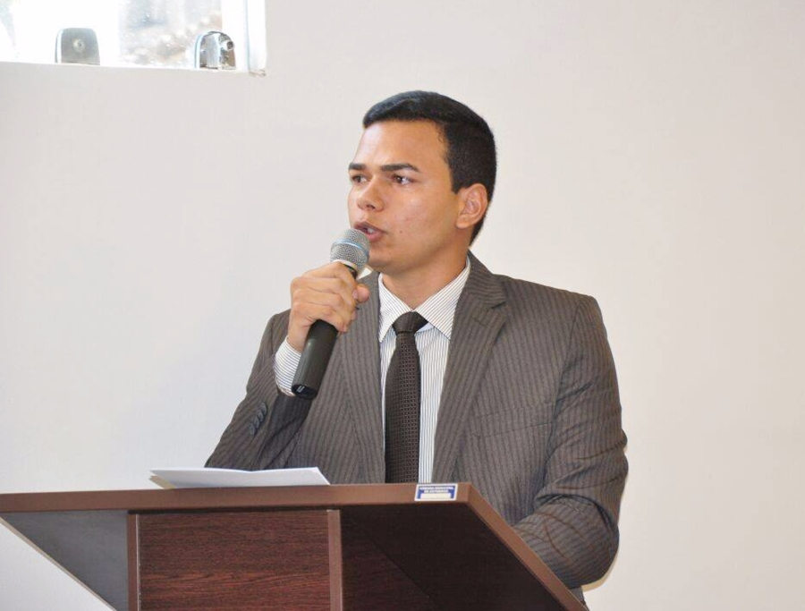 Joaz Oliveira